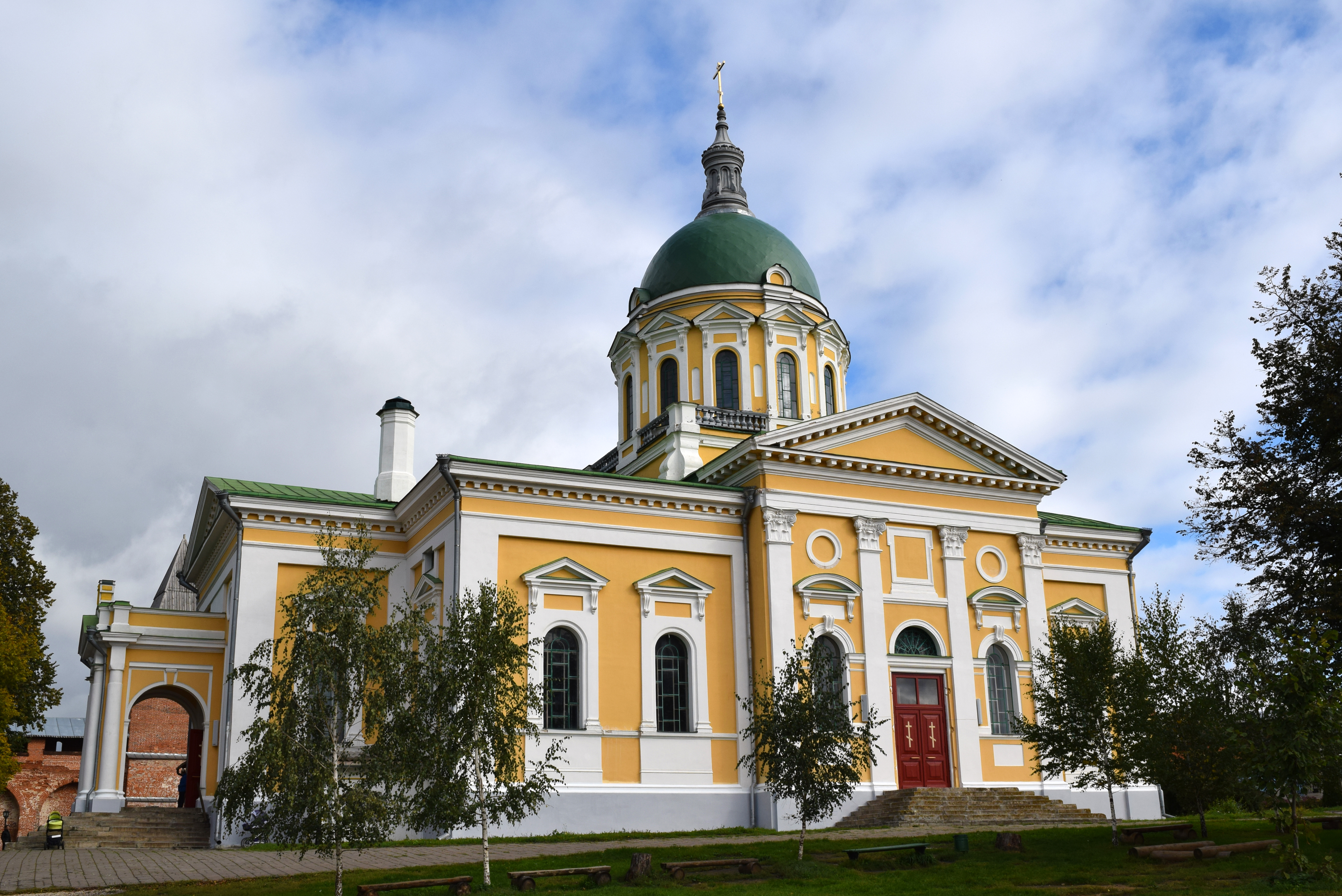 Основан в 1904 году. Памятник архитектуры федерального значения